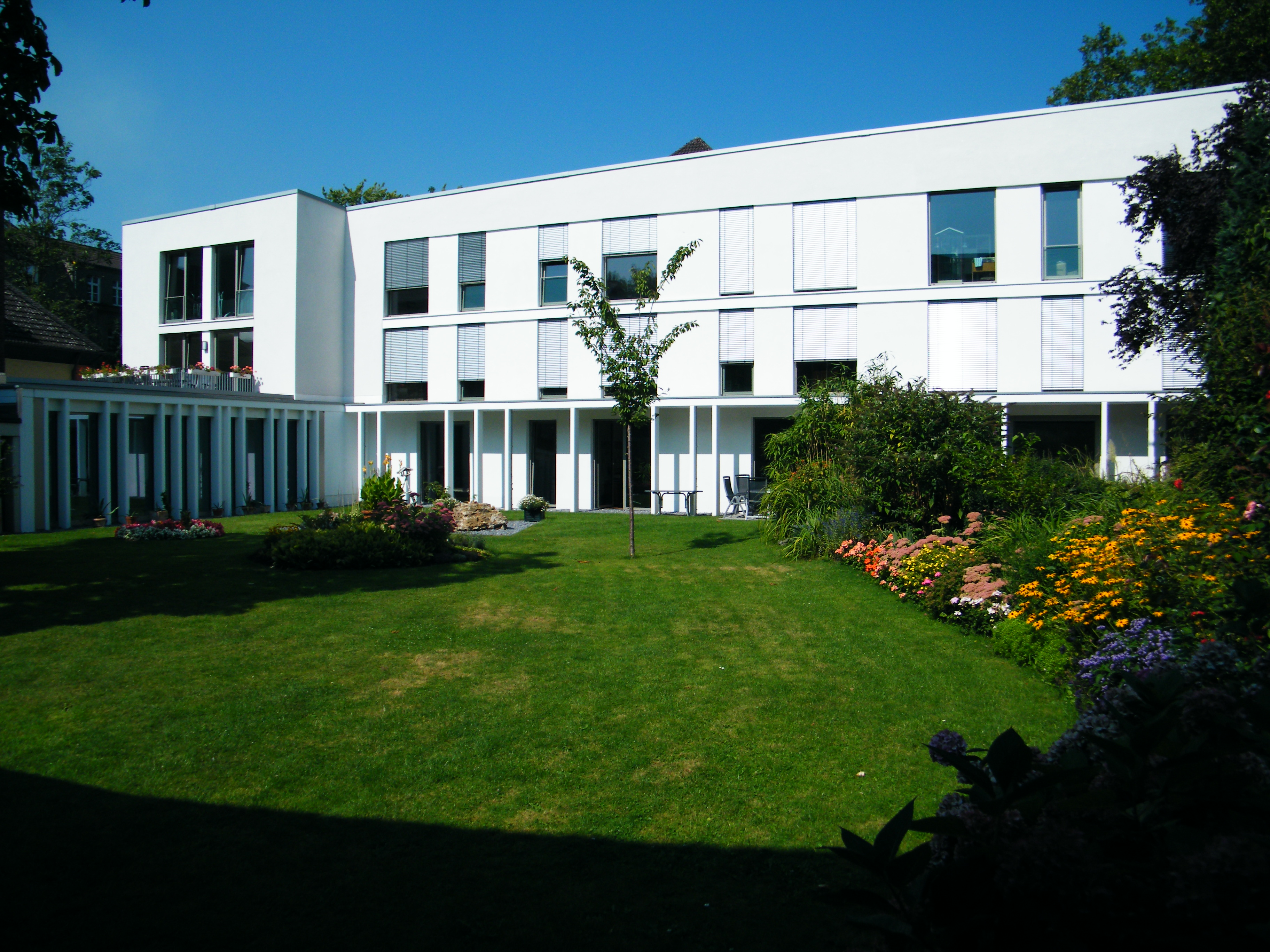 Der 2011 fertig gestellte Erweiterungsbau der Abtei Hamborn vom Klostergarten aus gesehen.